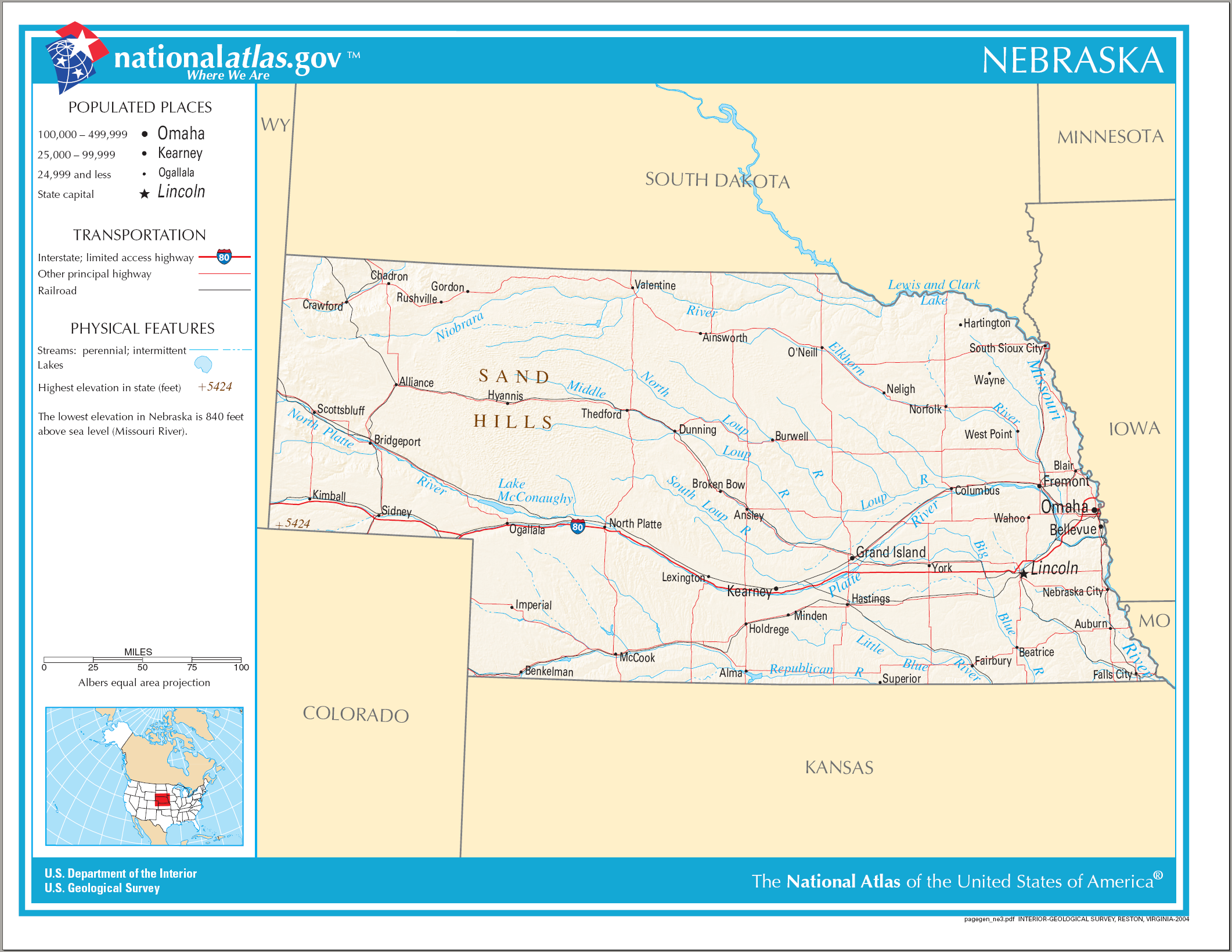 Map of Nebraska